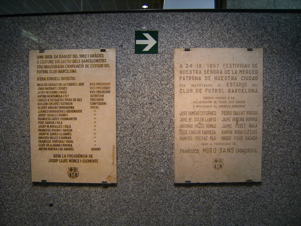 Plaques commémorant l'inauguration du Camp Nou en 1957 et sa rénovation en 1982